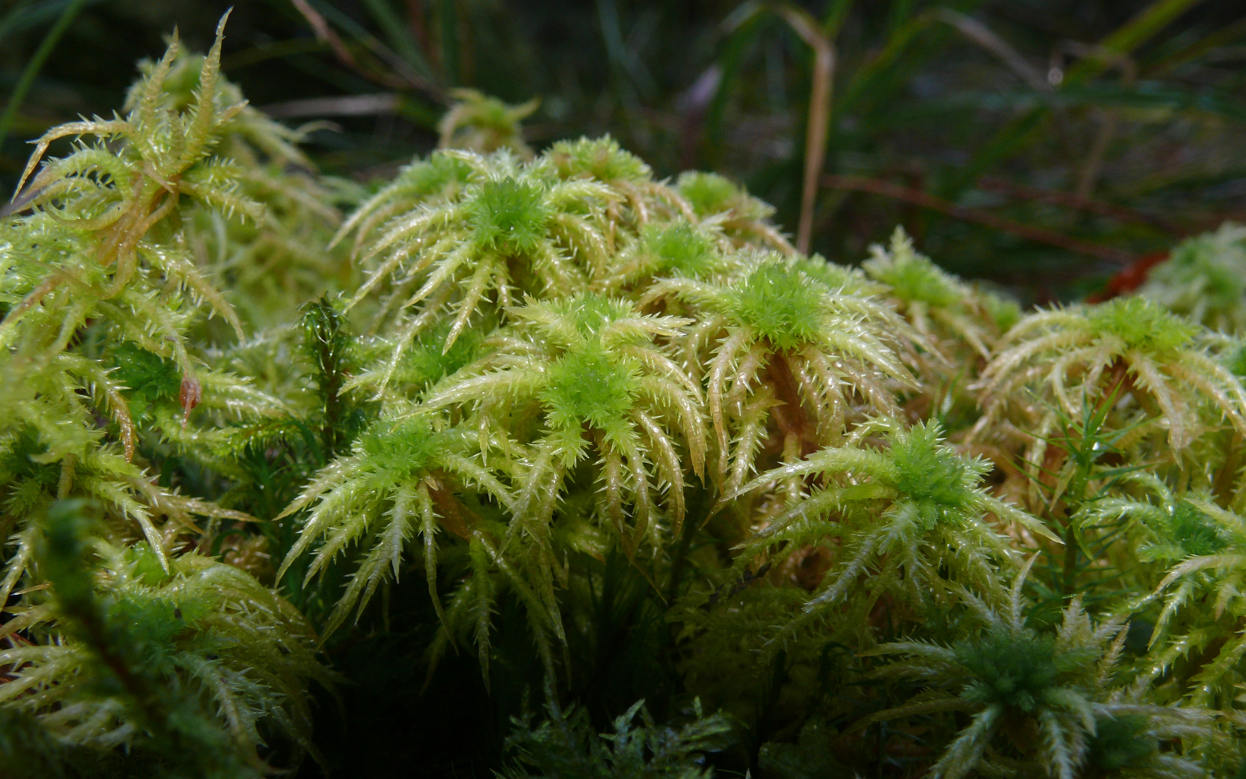 Sphagnum squarrosum, Schwäbisch-Fränkische Waldberge, Germany